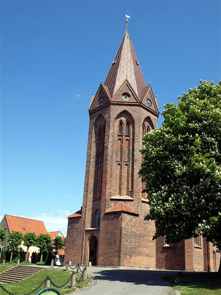 Assens Kirke i Danmark. Tårnet set fra sydvest